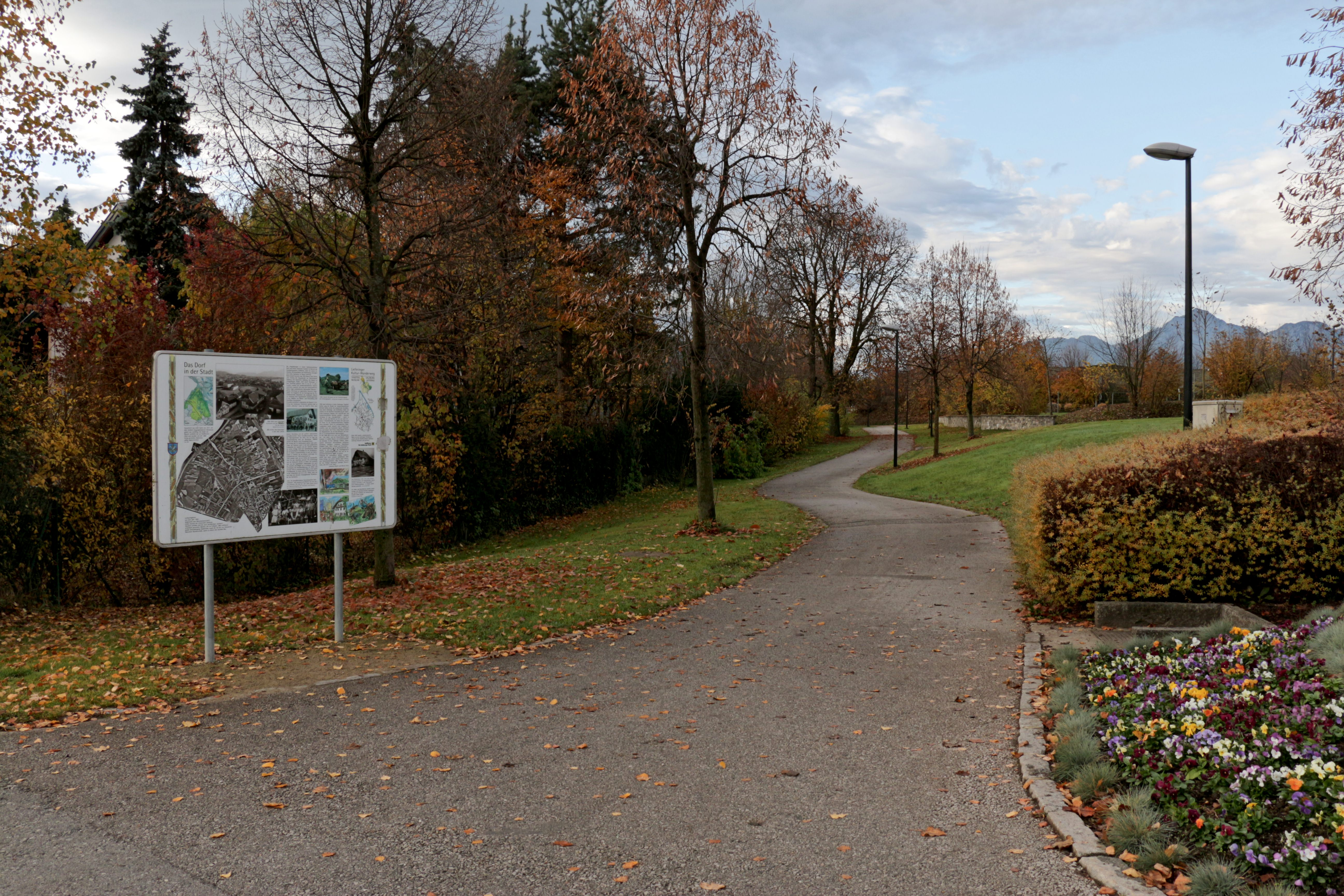 Eine Schautafel des Lieferinger Kulturwanderwegs im Salzburger Stadtteil Liefering über dem Lieferinger Tunne der Westautobahn A1